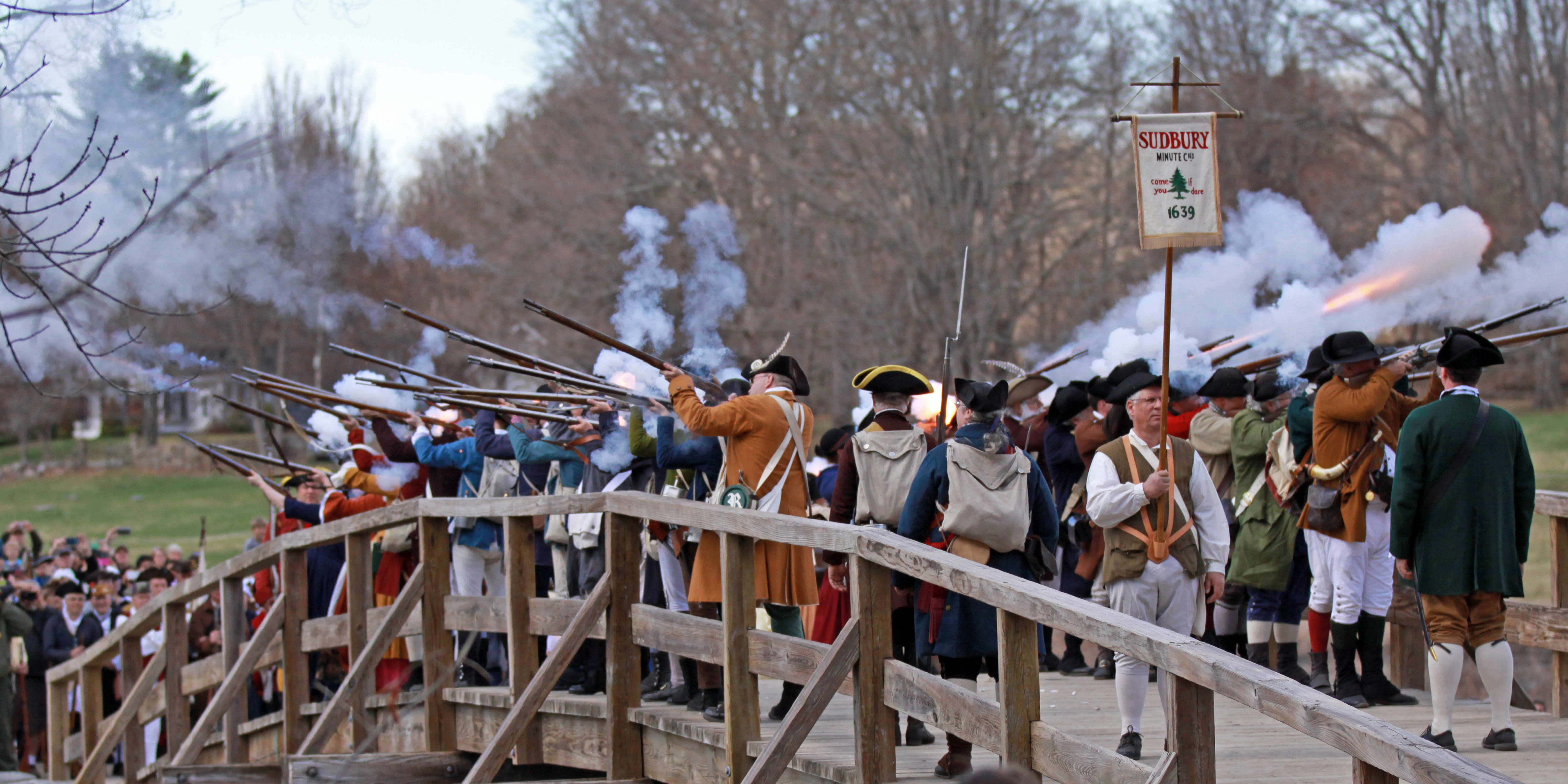 Reconstitution contemporaine d'une milice américaine du milieu du XVIIIème siècle, probablement fondée en 1639 (d'après la date du fanion). Devise : Viens si tu oses (Come if you dare). Milice de la ville de Sudbury (dans le Vermont ou le Massachusetts).